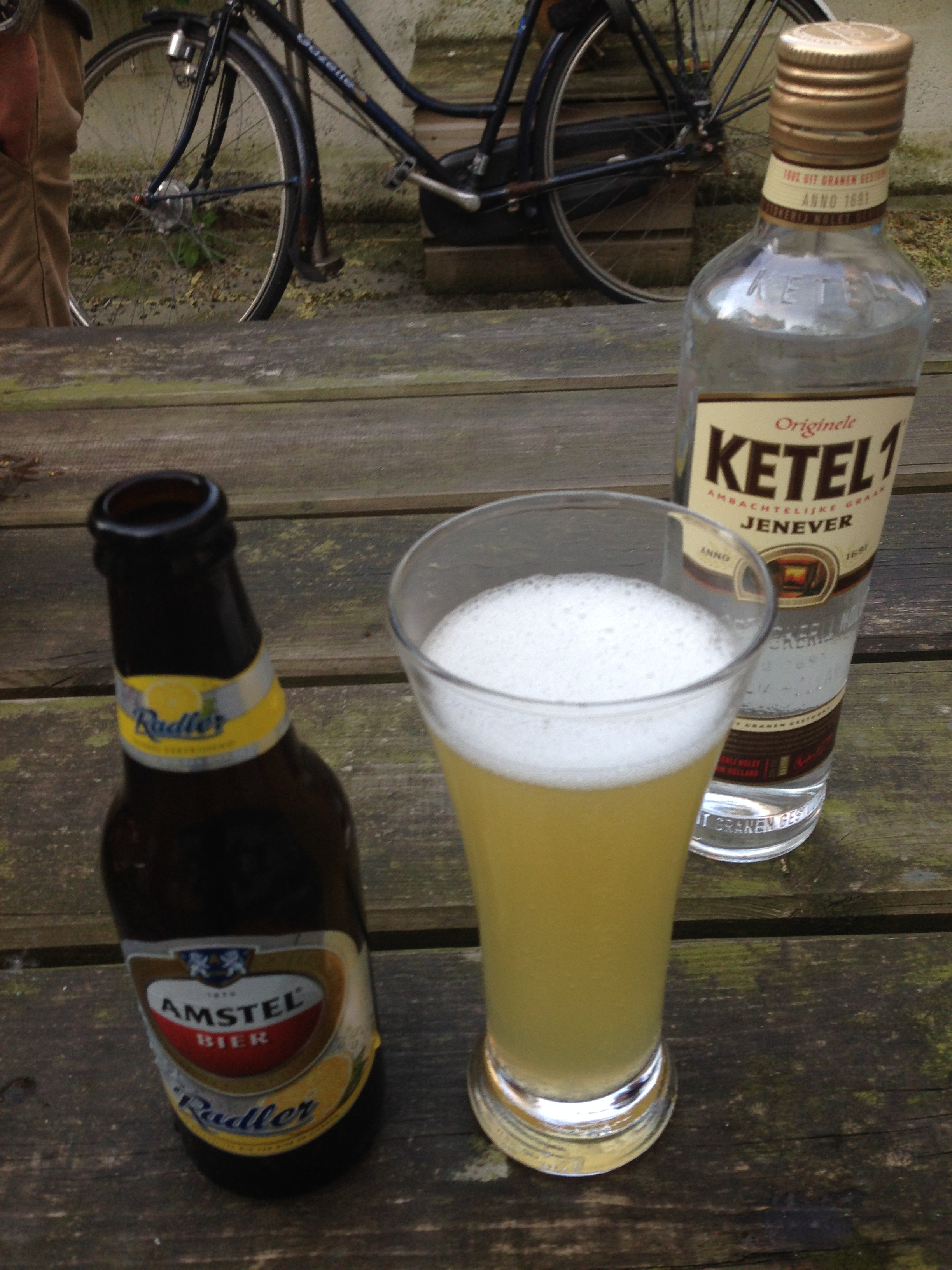 mixdrank van Jenever en citroen Radler